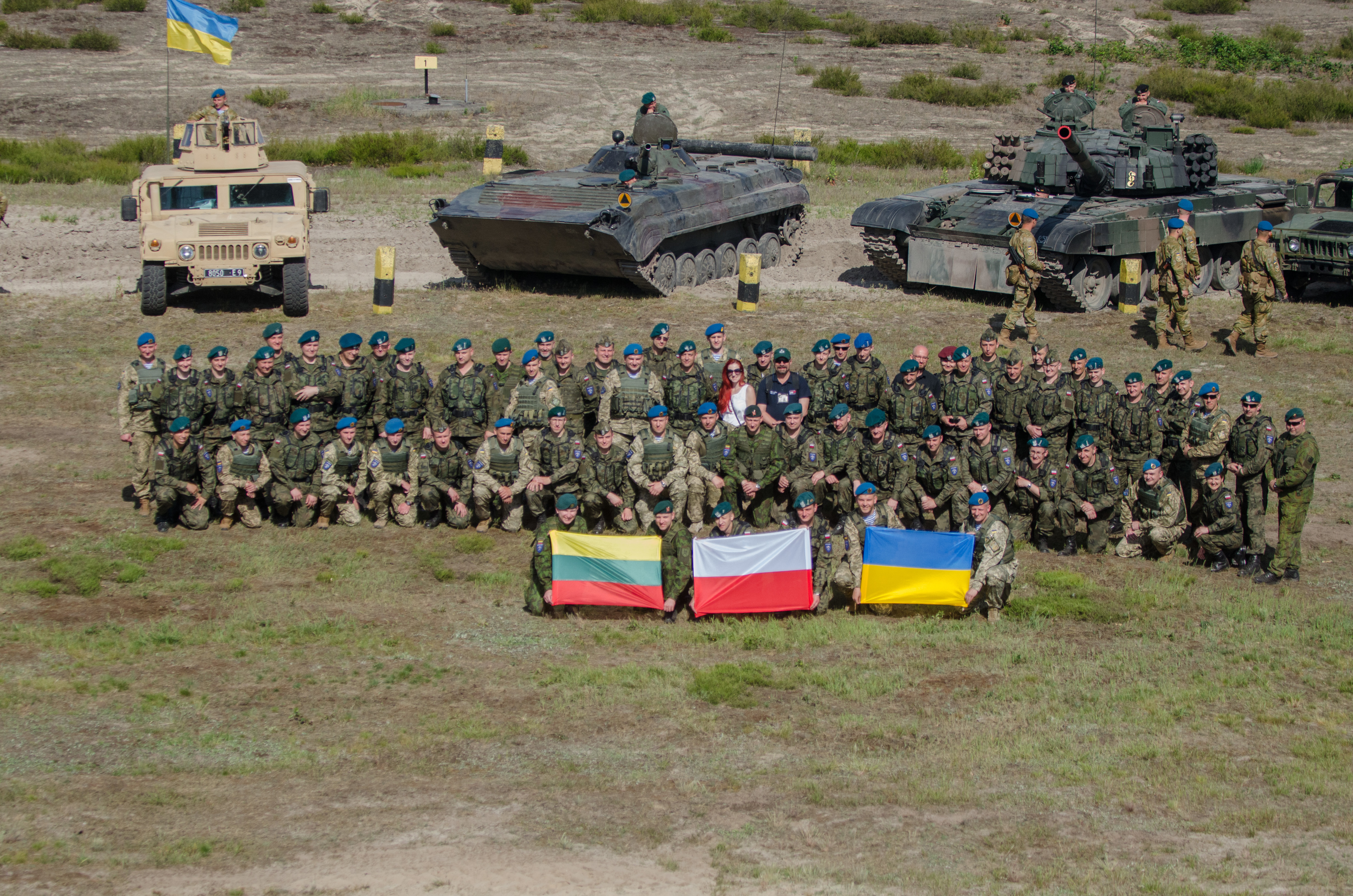 Совместная Литовско-польско-украинская бригада на церемонии открытия учений "Анаконда-2016" на полигоне Новая Деба в Польше. Украинский взвод 80-й отдельной аэромобильной бригады вошел в состав польского батальона. Крайний слева на фото HMMWV M1114 UAH 80-й аэромобильной бригады.